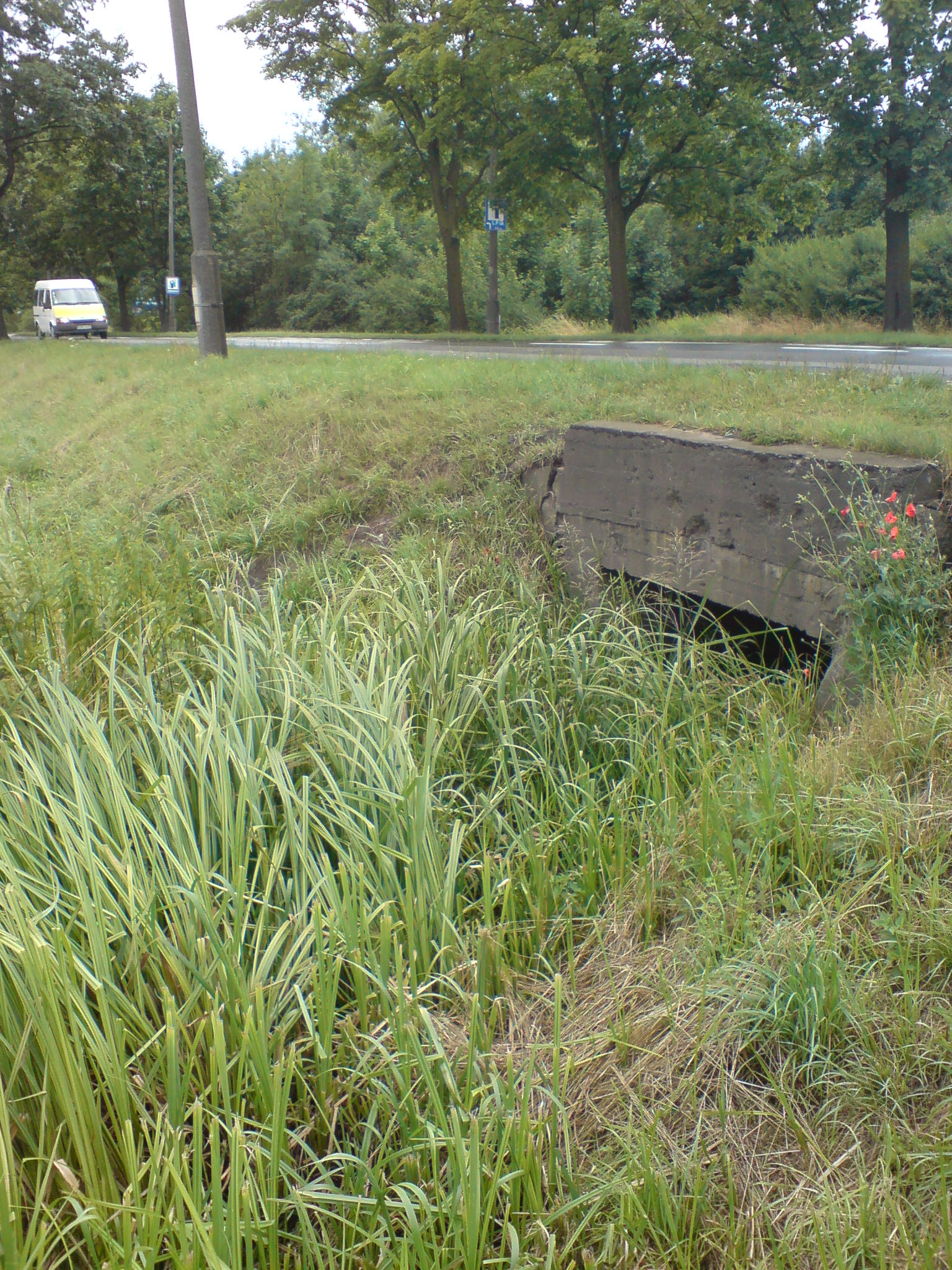 Końcowy odcinek ulicy Żmigrodzkiej we Wrocławiu - strumień Mokrzyca wpływający pod ulicę.